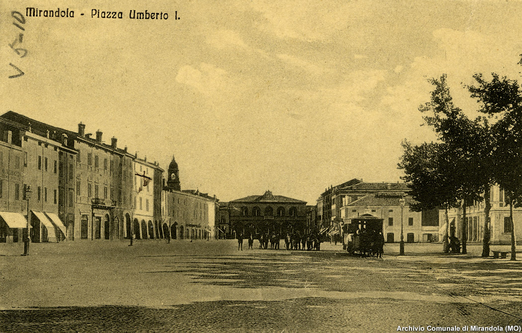 Mirandola, cartolina di piazza Umberto I. Sulla destra si nota un tram a cavalli.